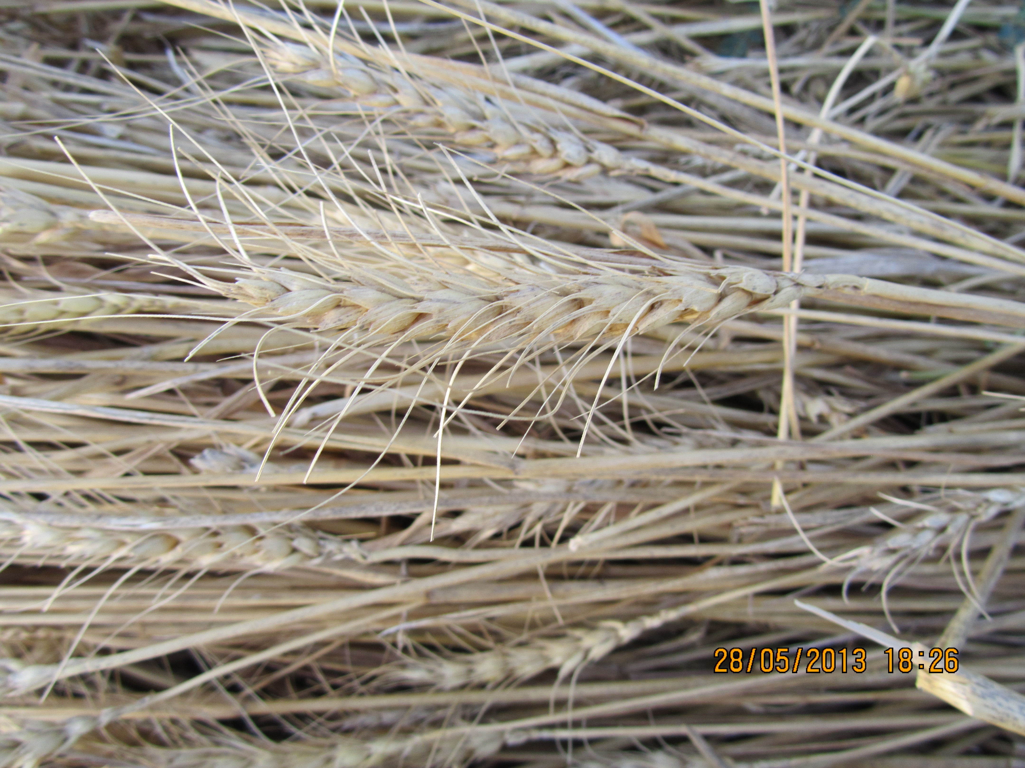 عکس از یک خوشه گندم مربوط به روستای قزقلعه